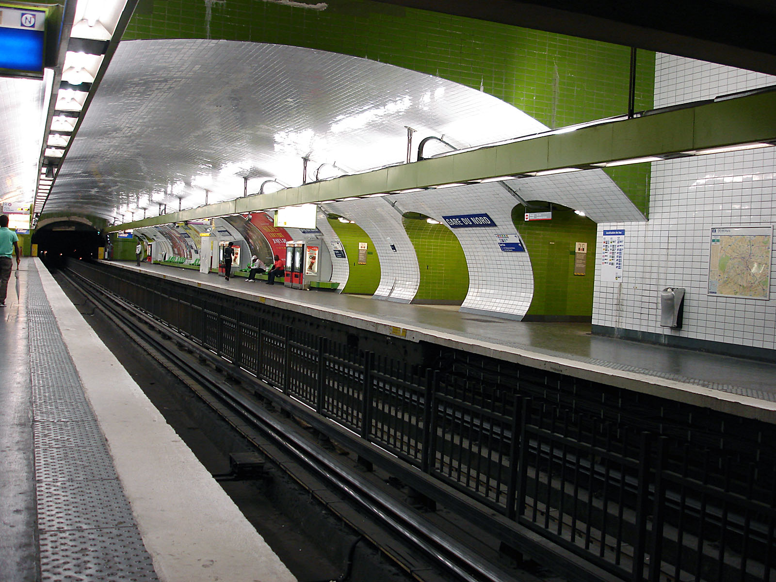 La station Gare du Nord de la ligne 4 du métro de Paris, France.